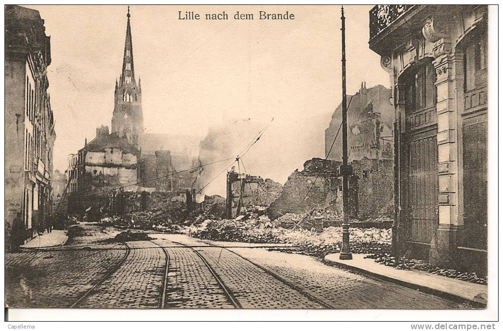 Bildseite der Ansichtskarte von Alfred Grohs aus der Zeit des Ersten Weltkrieges, hier mit dem Titel Lille nach dem Brande"...